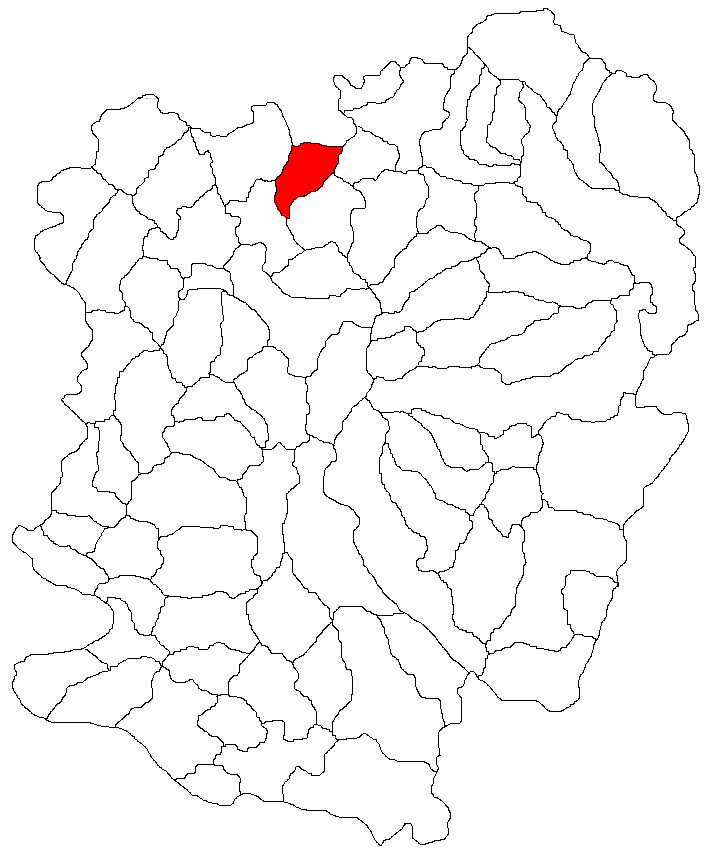 Categorie:Hărţi ale judeţului Caraş-Severin